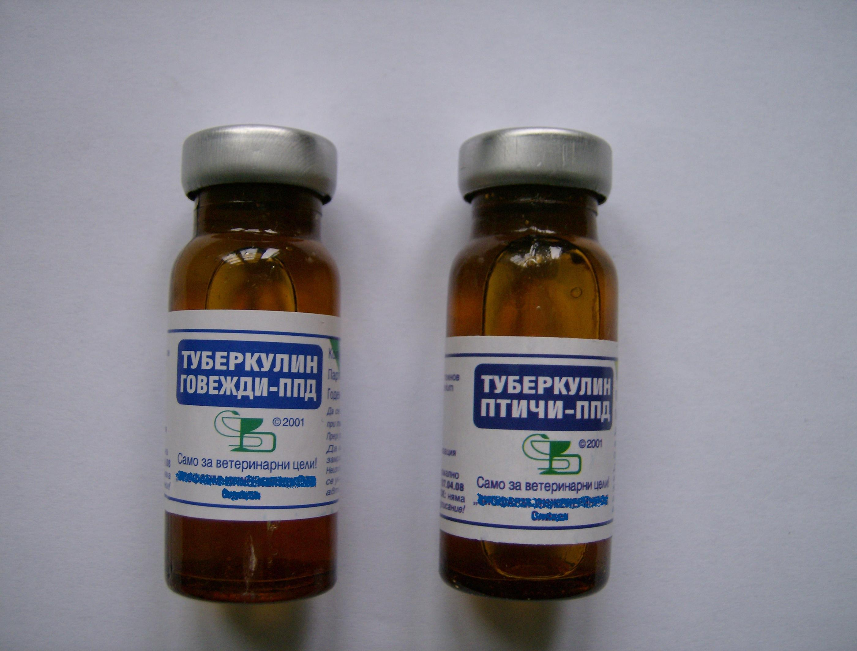 Говежди и птичи туберкулин